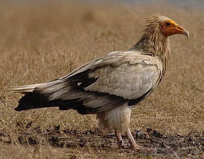 Egyptian Vulture